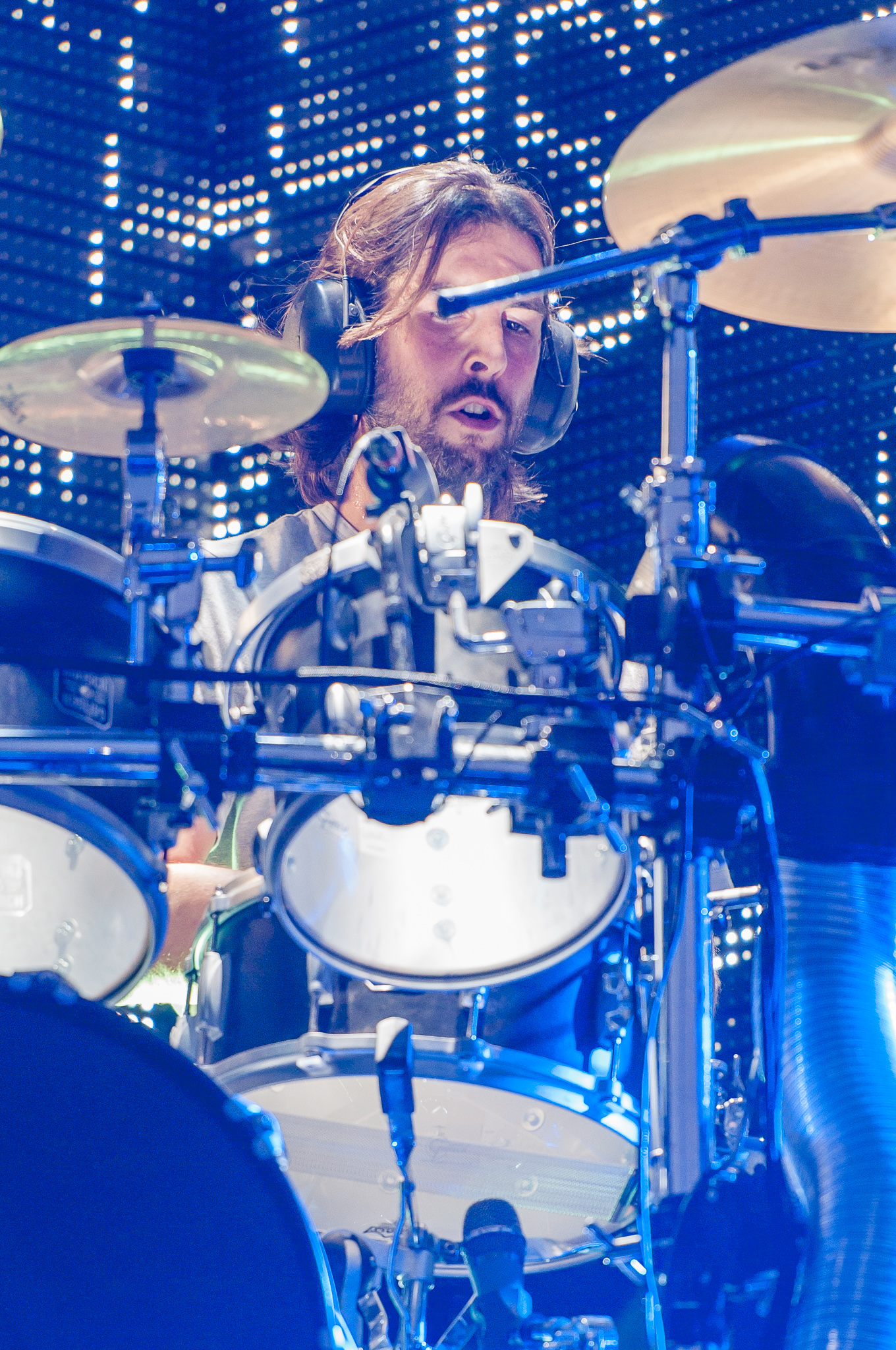 ARGO-Konzerte,Centerstage,Konzert,Linkin Park,Livekonzert,Livemusik,Musik,RiP,Rob Bourdon,Rock im Park 2014